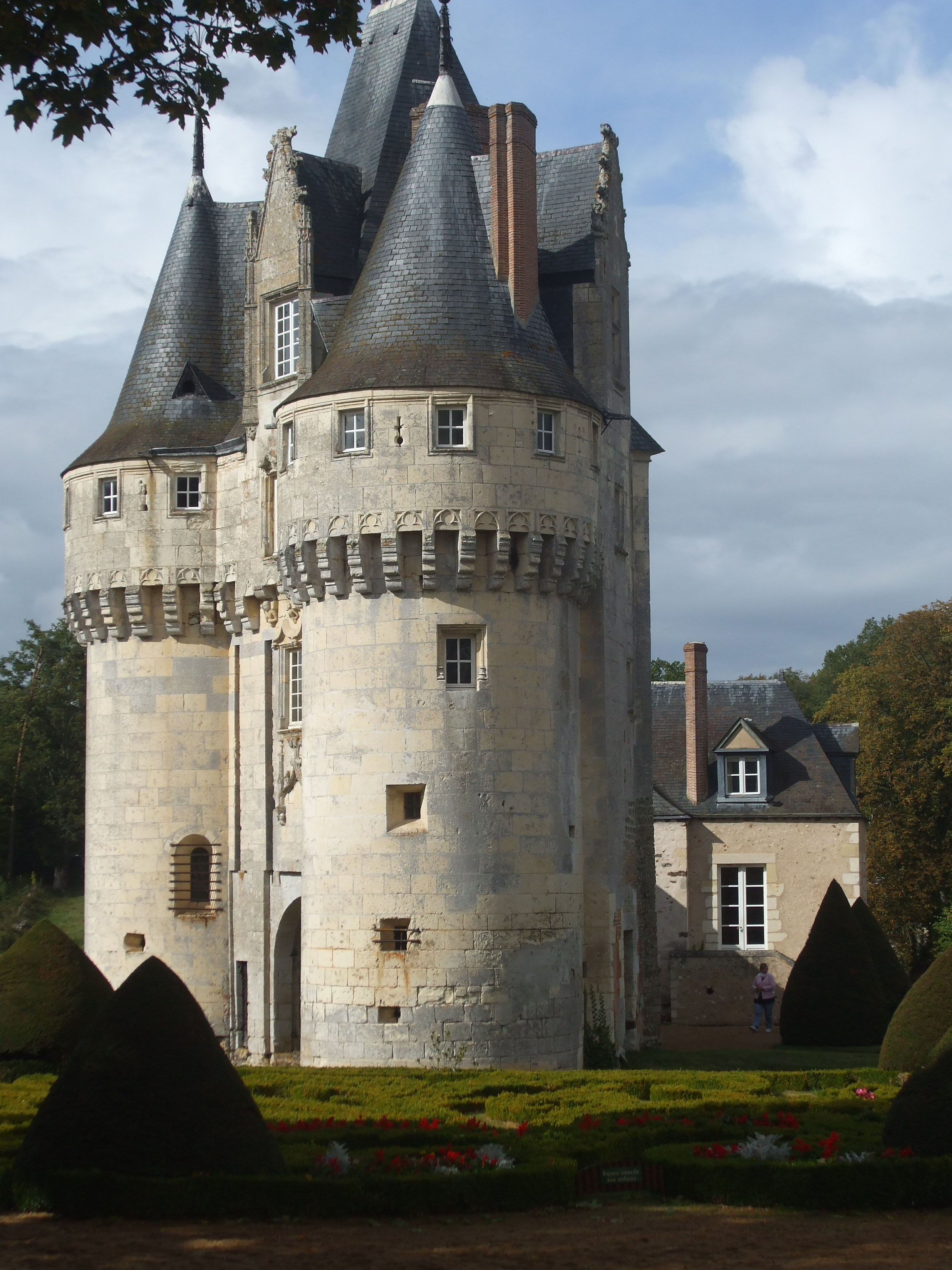 Une partie du château de Frazé